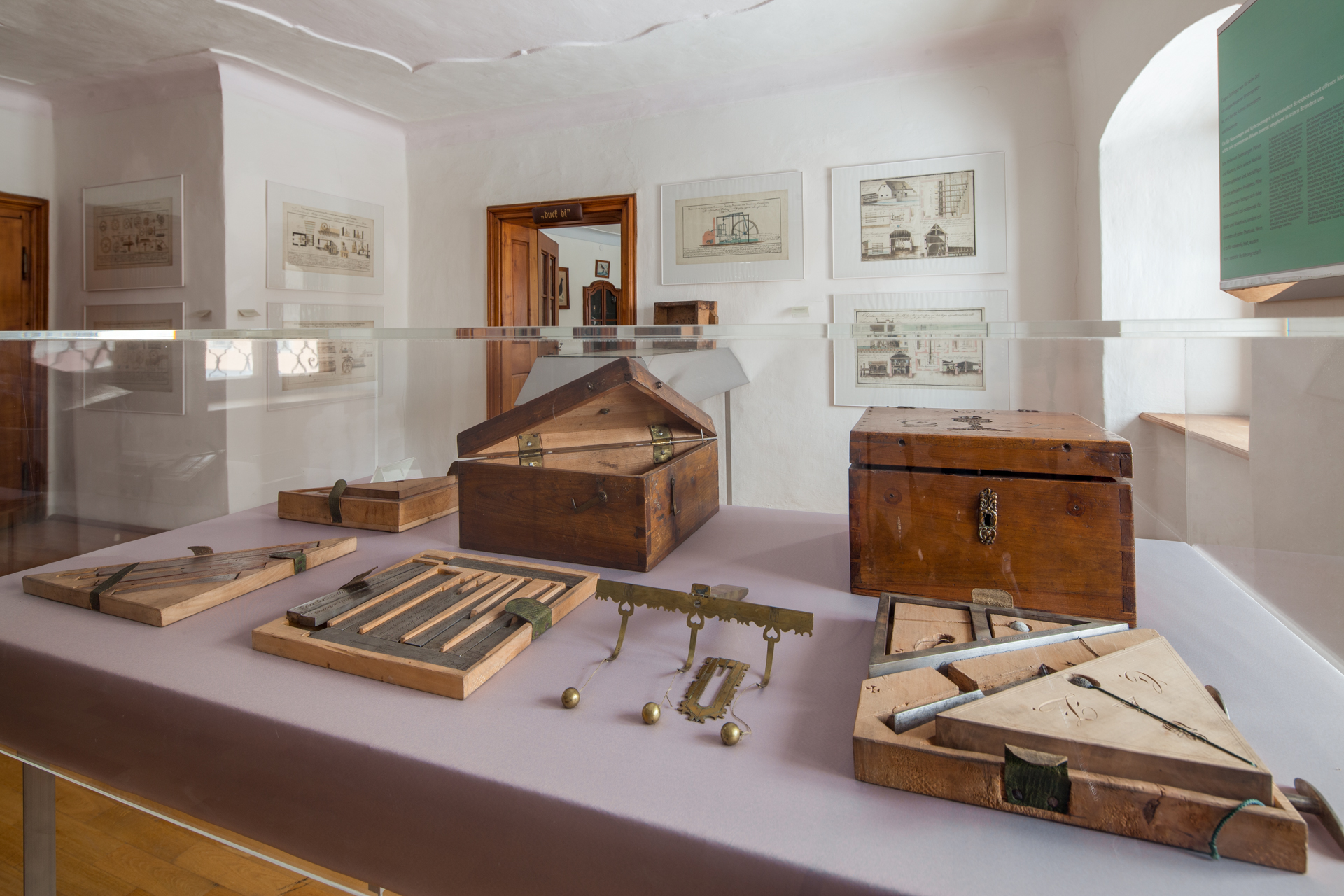 OÖ. Sensenschmiedemuseum in Micheldorf, Vitrine mit Messinstrumenten Caspar Zeitlingers. Diese Messinstrumente dienten zum Einrichten der Essfeuer.